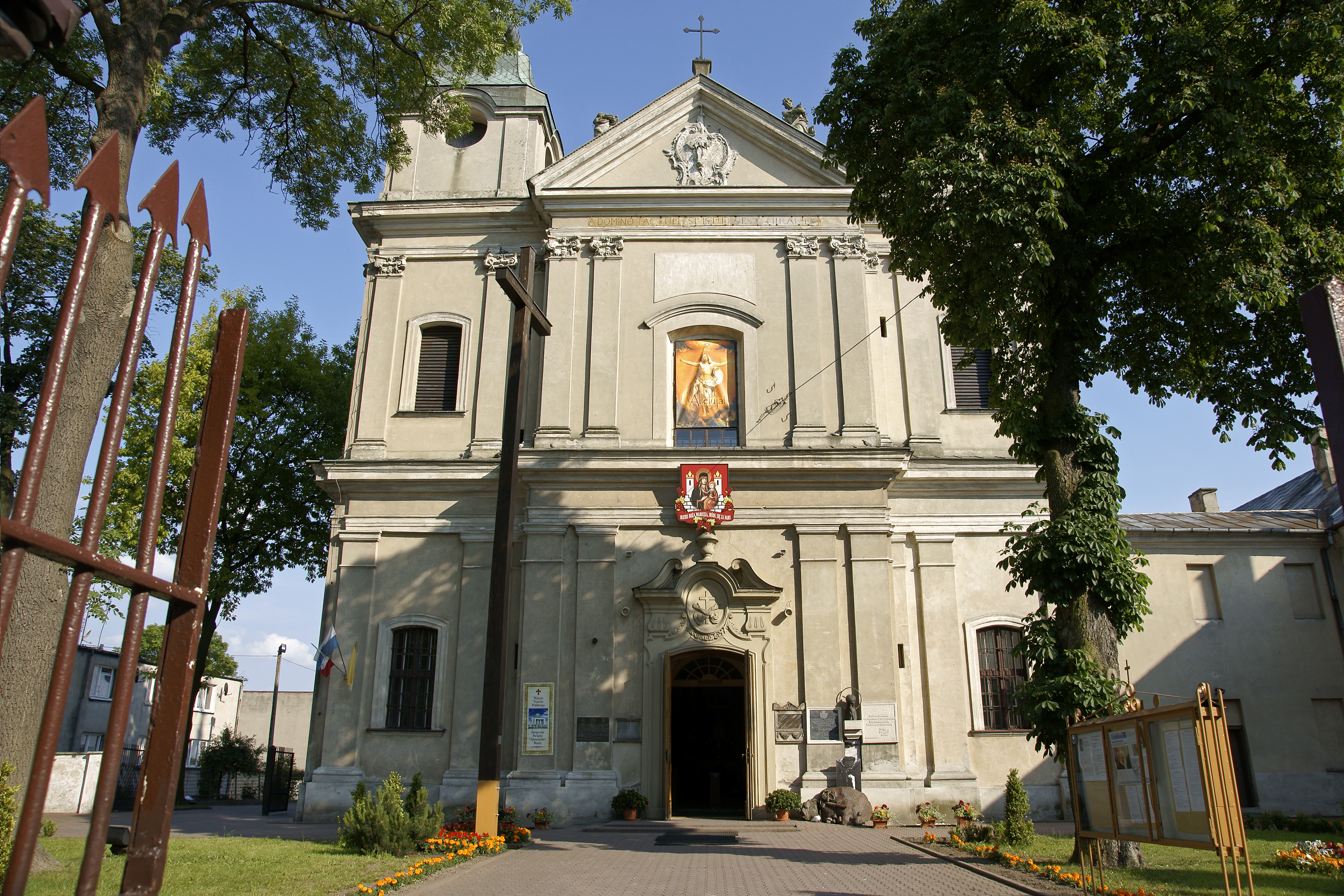 zespół klasztorny franciszkanów, XVII/XVIII: kościół p.w. MB Szkaplerznej dzwonnica klasztor Warka, Gmina Warka